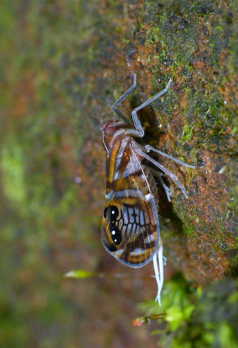 Brixia albomaculata, Cixiidae, Wynaad, India